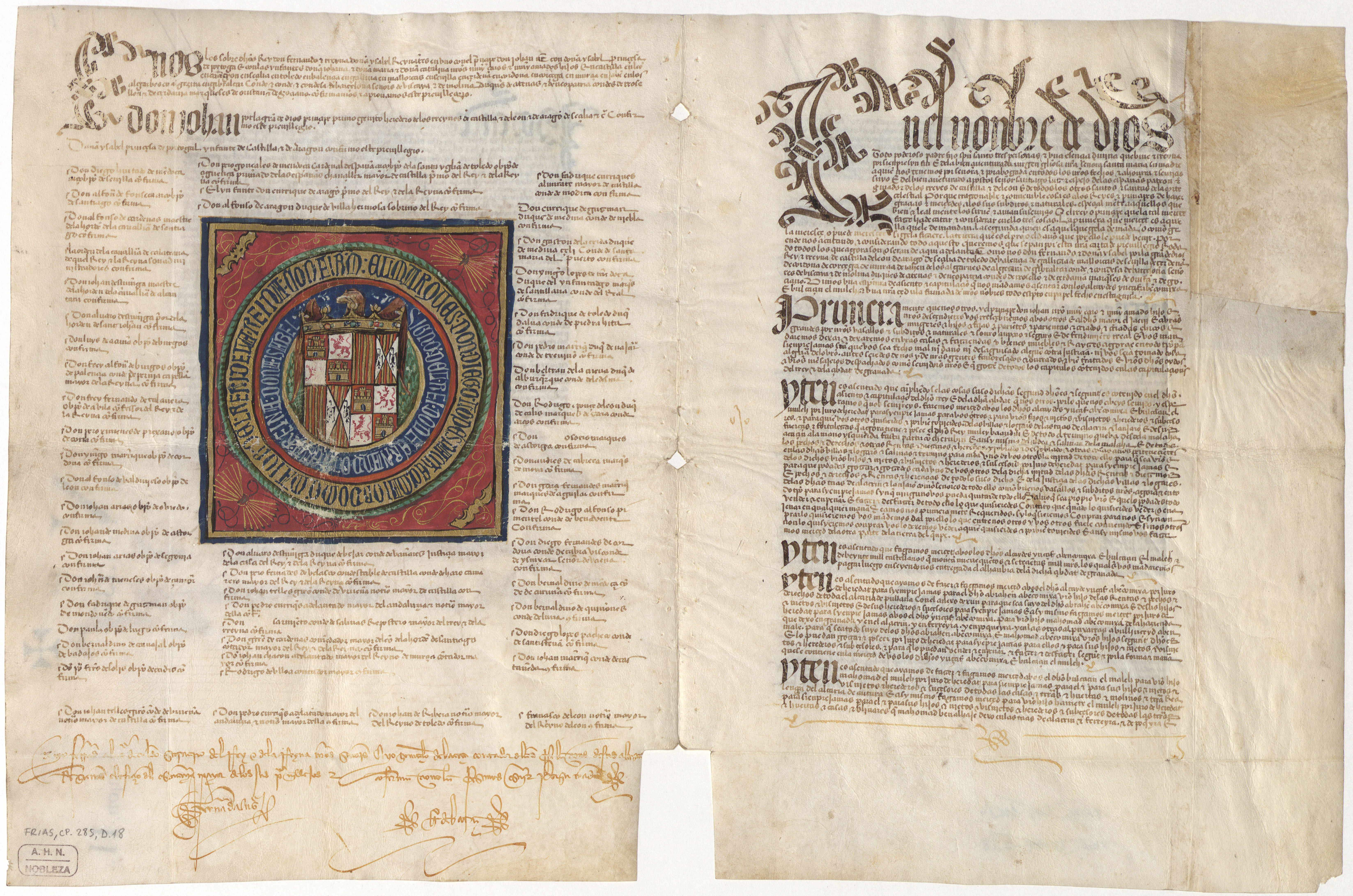 Privilegio rodado de las capitulaciones de Granada, fechadas a 30 de diciembre de 1491 (el texto dice 1492 porque en aquella época en España el año empezaba el 25 de diciembre).